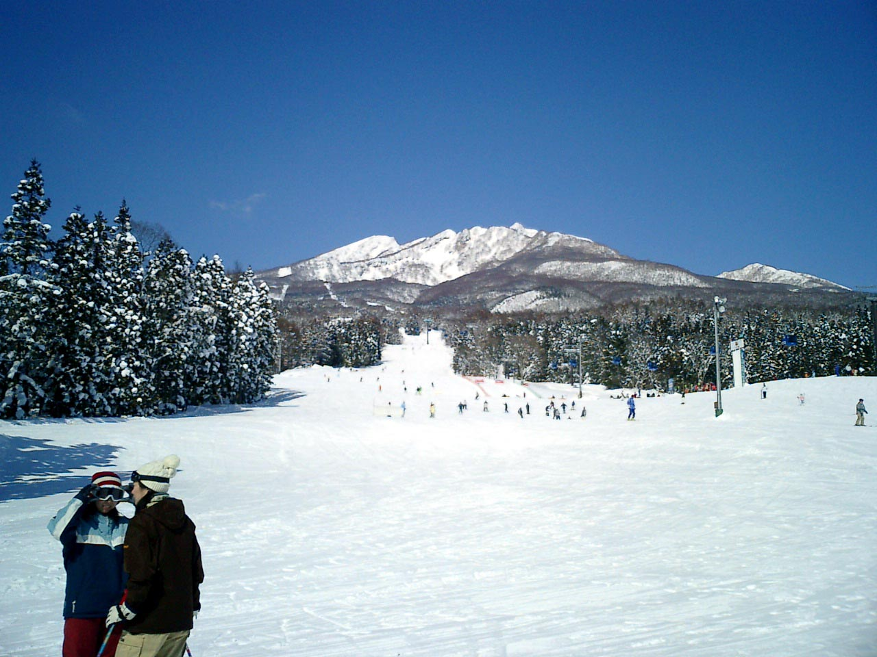 妙高杉ノ原スキー場 杉の原ゲレンデ駐車場付近にて撮影